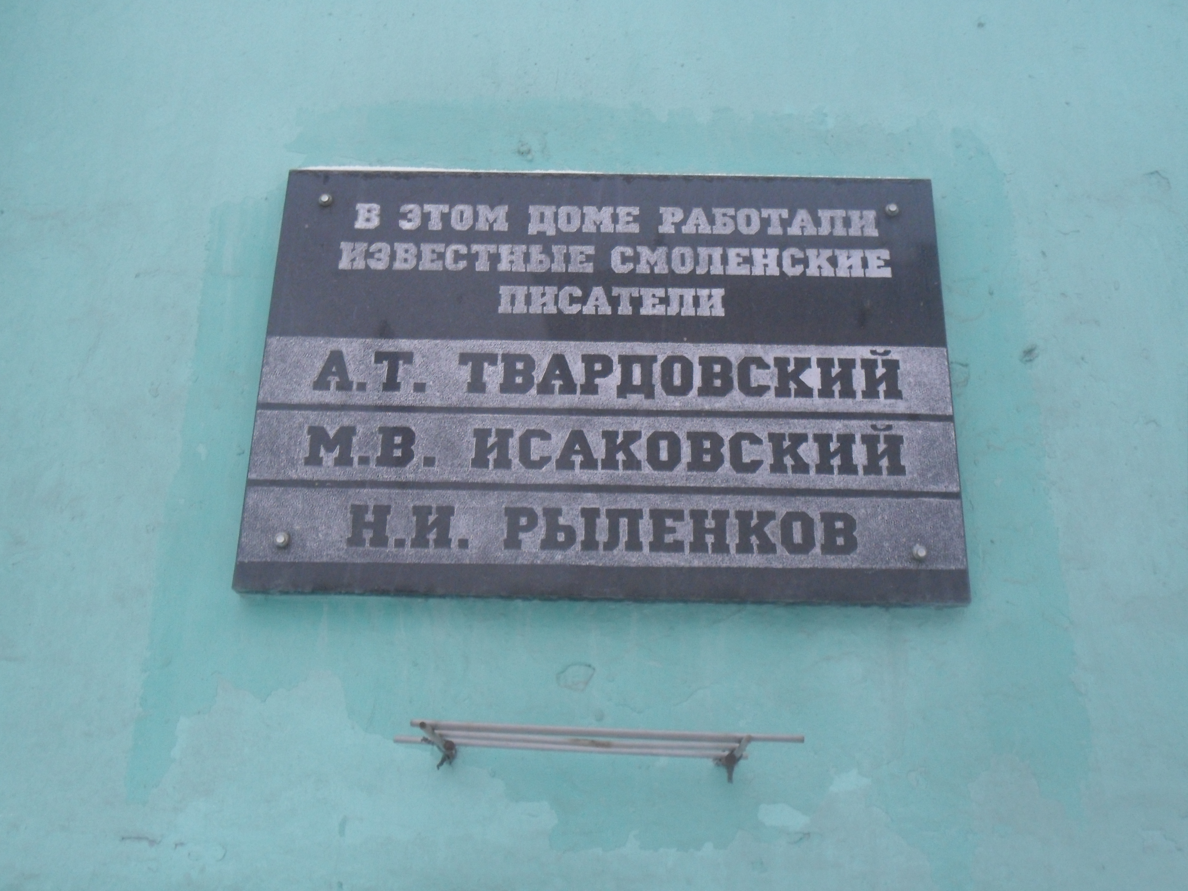 Мемориальная доска поэтам Твардовскому, Исаковскому и Рыленкову на Доме Книги в Смоленске